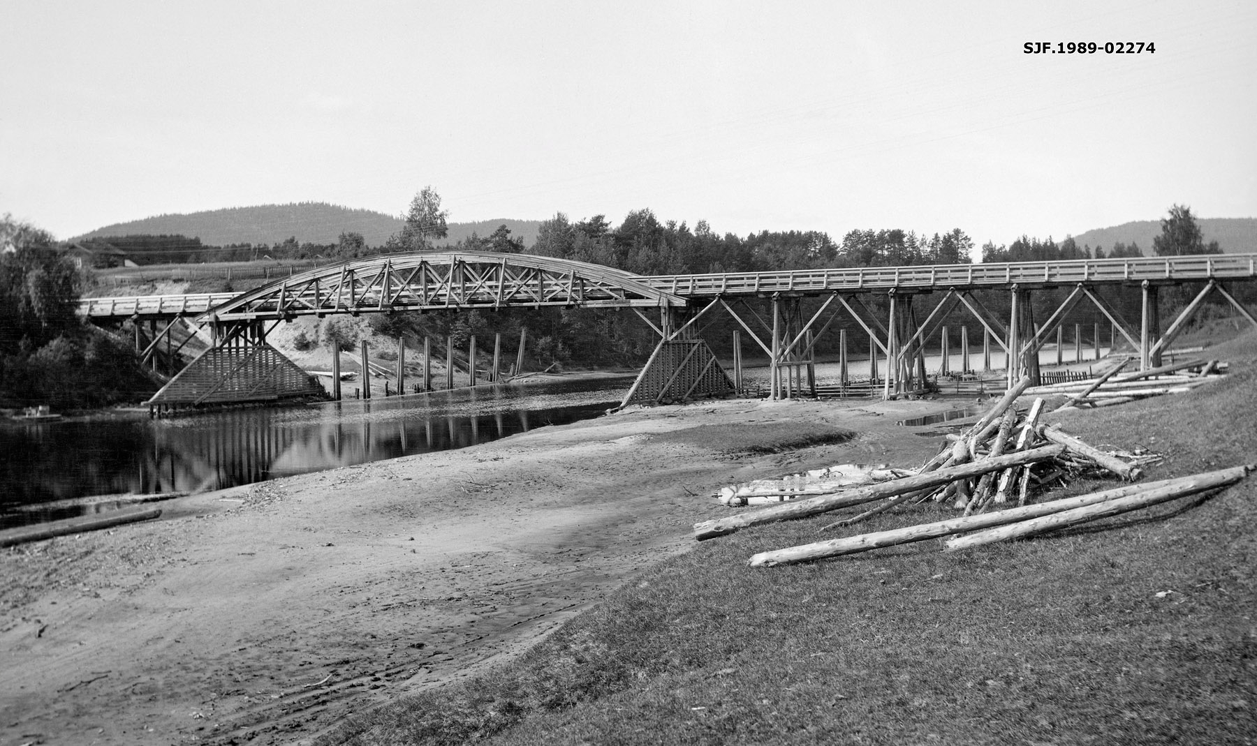 Den vestre Flisbrua over Glomma i Åsnes kommune i Solør, før 2003